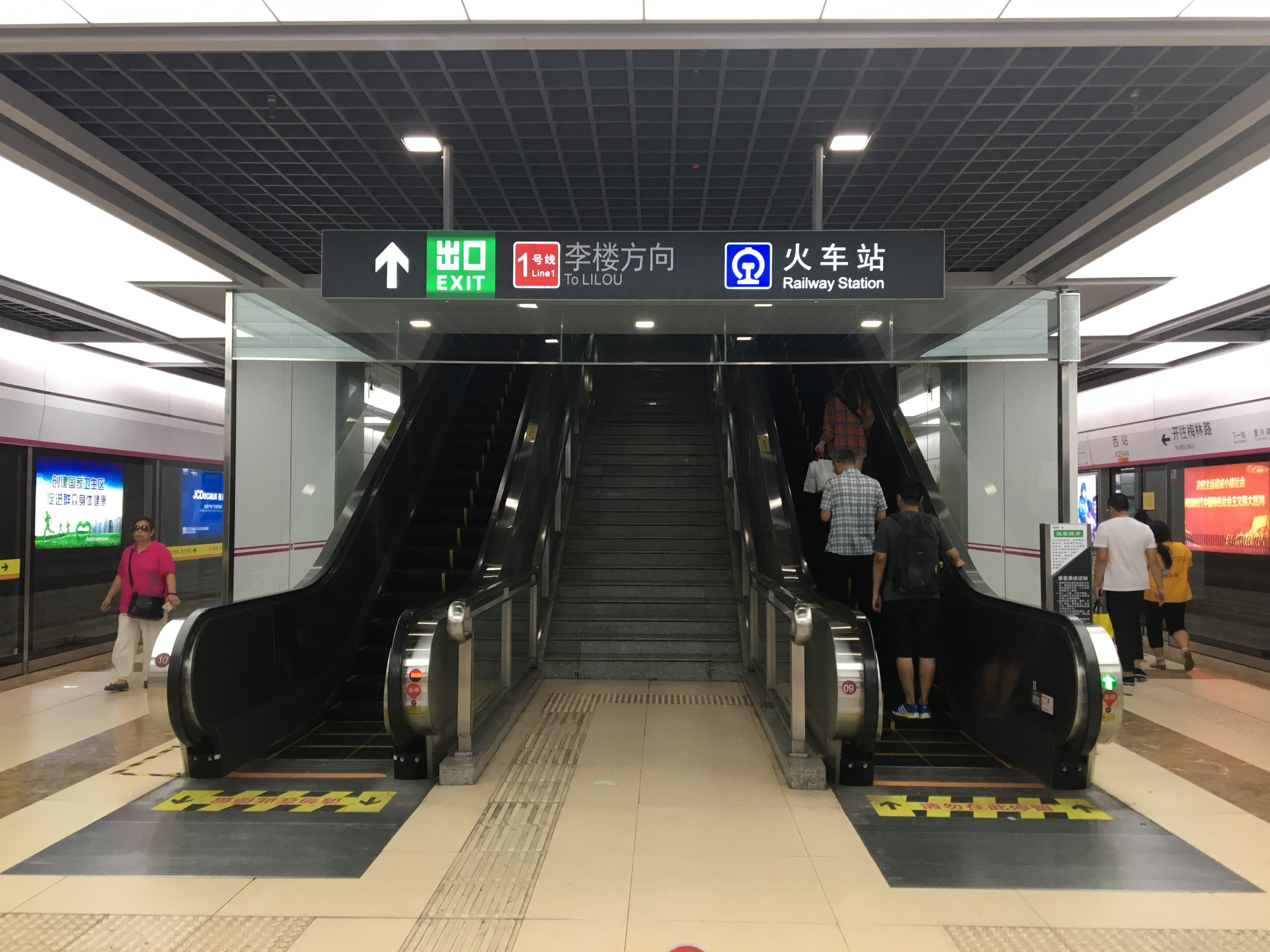 天津地铁西站6号线站台